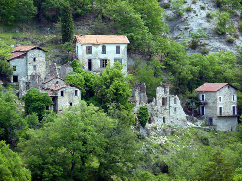 Hameau de Béasse